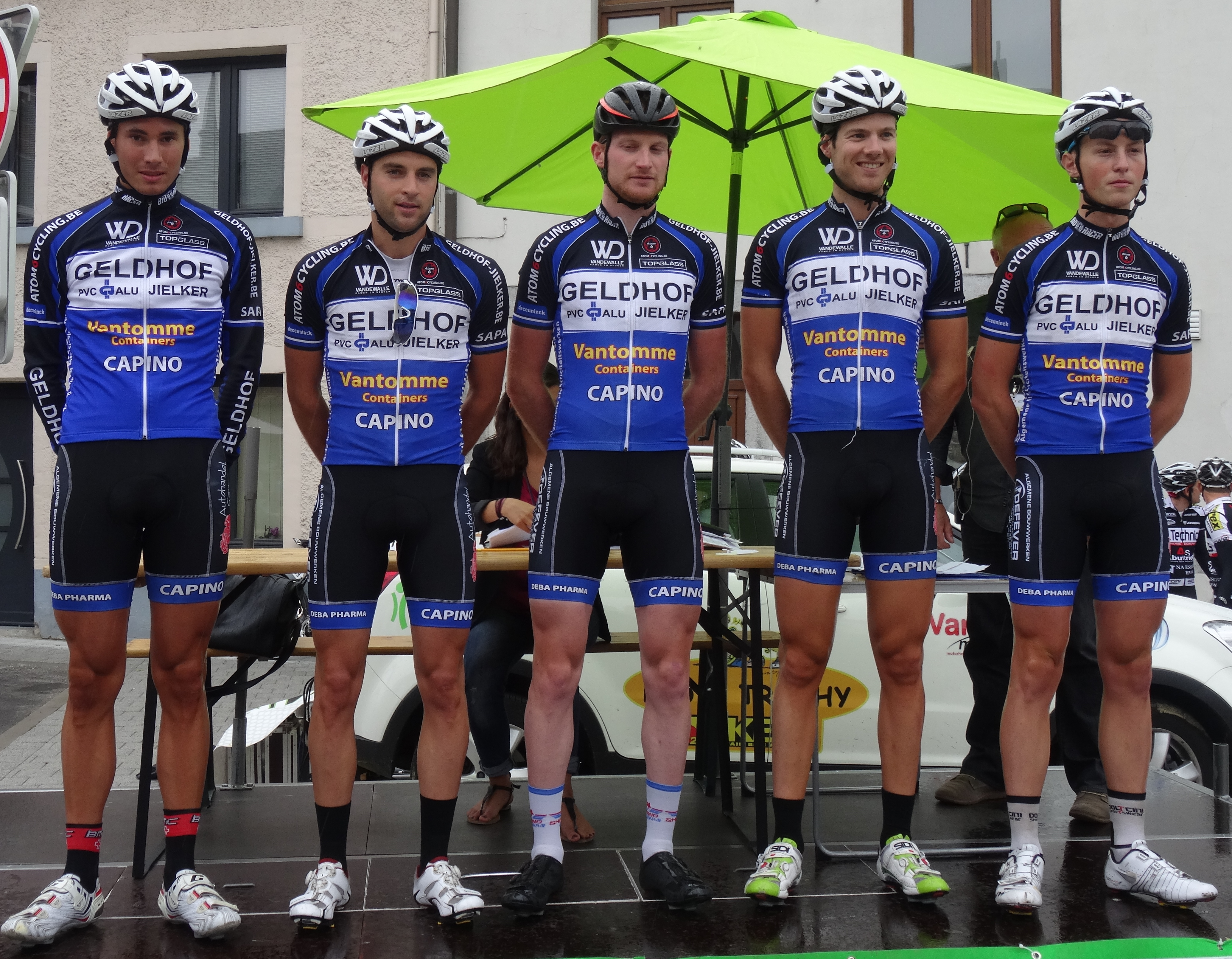 Reportage photographique réalisé le mercredi 6 août à l'occasion du départ de la première étape du Tour de la province de Namur 2014 à Jambes (Namur), Belgique.